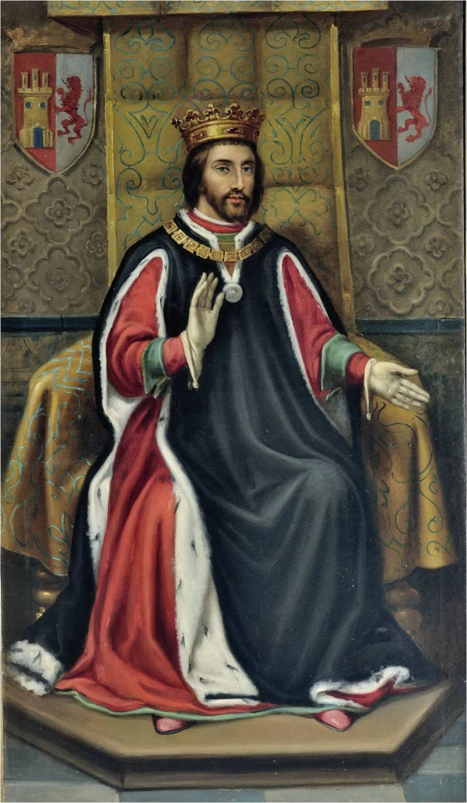 Retrato imaginario del rey Enrique III de Castilla (1379-1406). Fue hijo del rey Juan I de Castilla y de la reina Leonor de Aragón. Falleció en 1406, a los 27 años de edad y fue sucedido en el trono por su hijo, Juan II de Castilla.